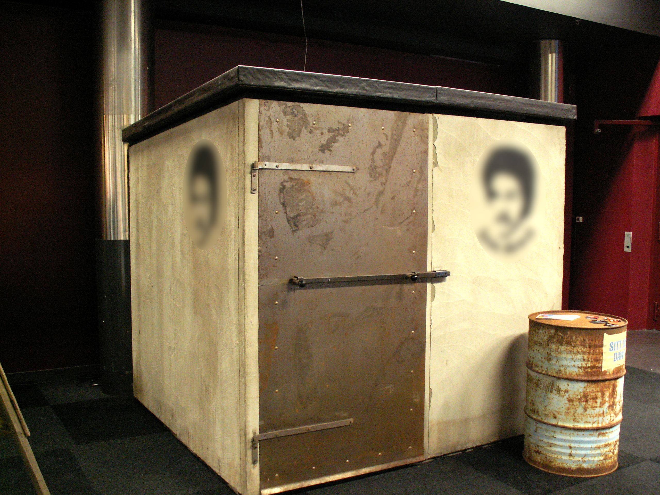 Uppbyggd kopia av Dawit Isaaks förmodade fängelse/cell i Eritrea. Utställd på Mediedagarna i Göteborg, mars 2015. Fotot på cellens yttervägg har gjorts suddigt för att inte inkräkta på förmodad upphovsrätt.